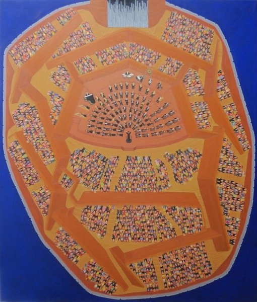 DR's Koncertsal. København. Orkester, parterre, 3 balkoner og 9 terasser. 92 musikere og 1797 publikummer. 127x150. Dorte Marcussen 2010. Olie på lærred.